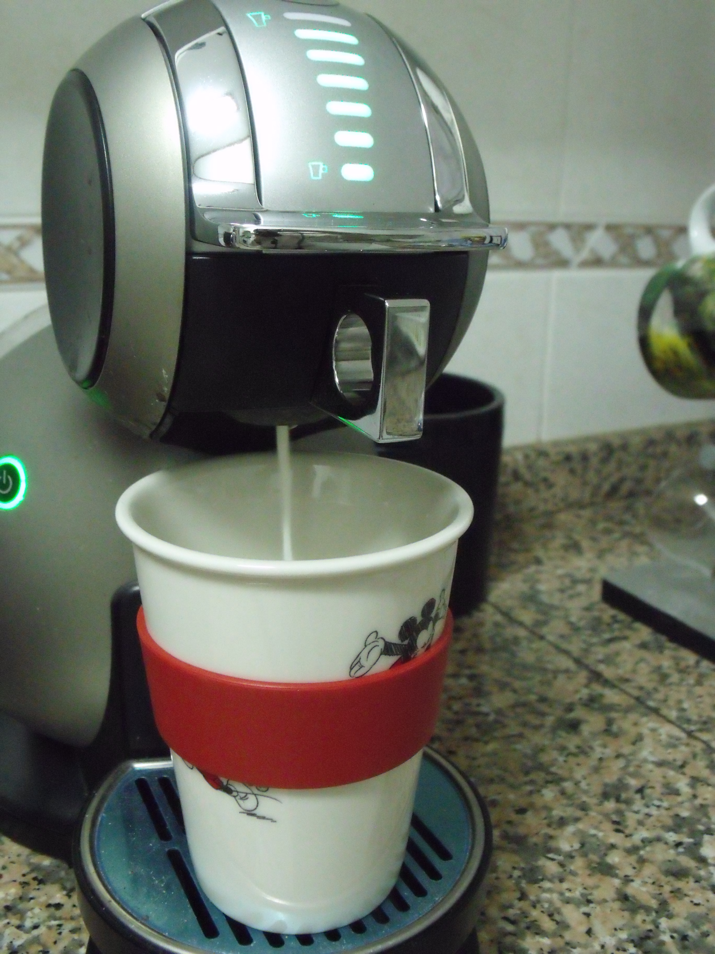 cafetera Dolce Gusto Nespresso en funcionamiento